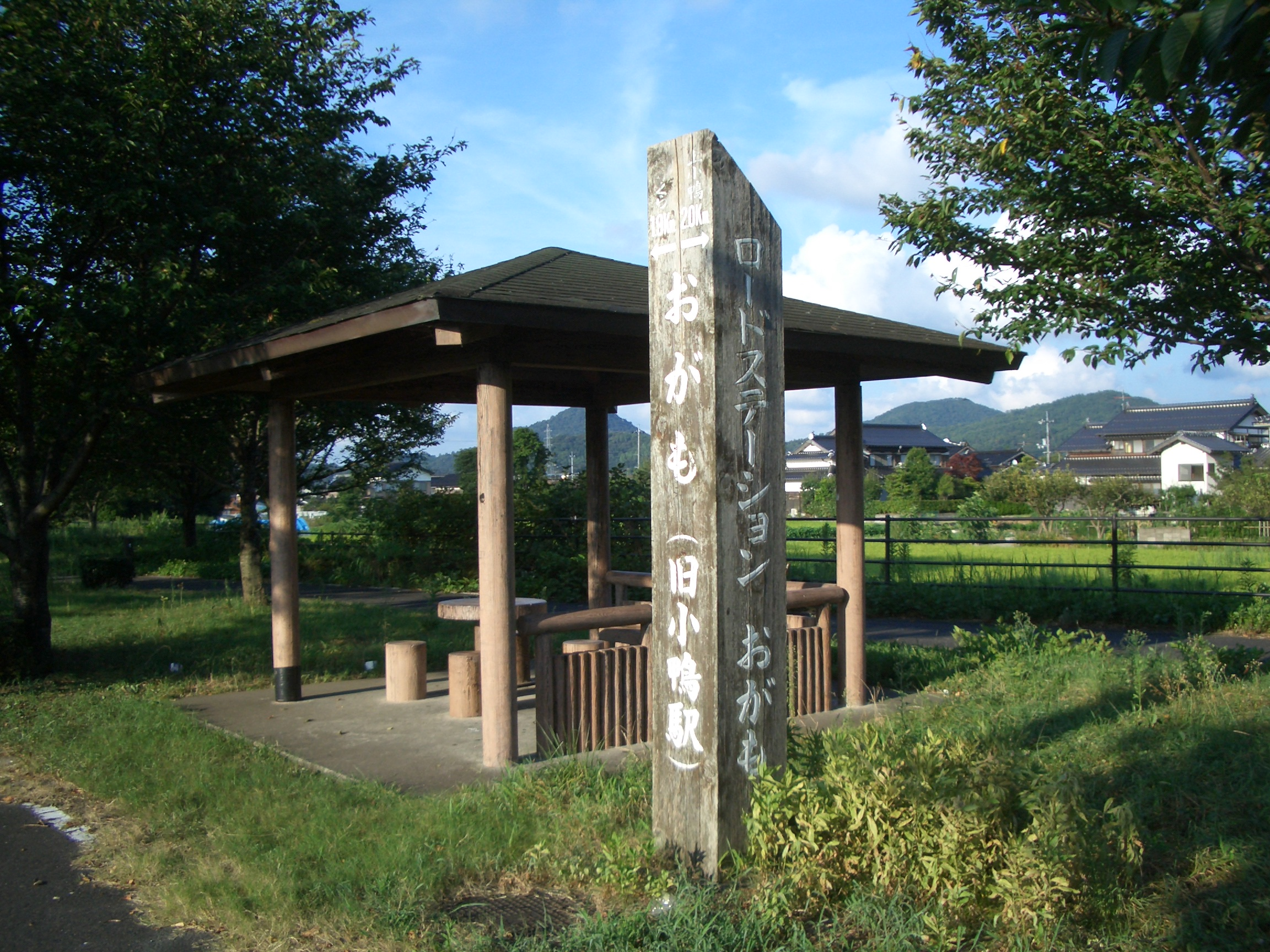 国鉄倉吉線小鴨駅跡地にある、ロードステーションおがも標柱